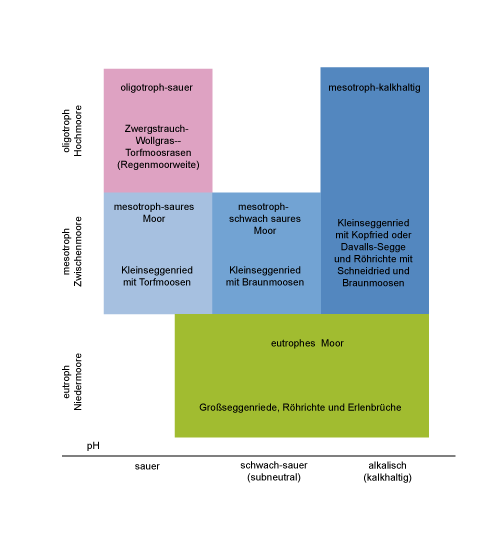 Ökologische Moortypen und ihre Charakterisierung durch die Vegetation